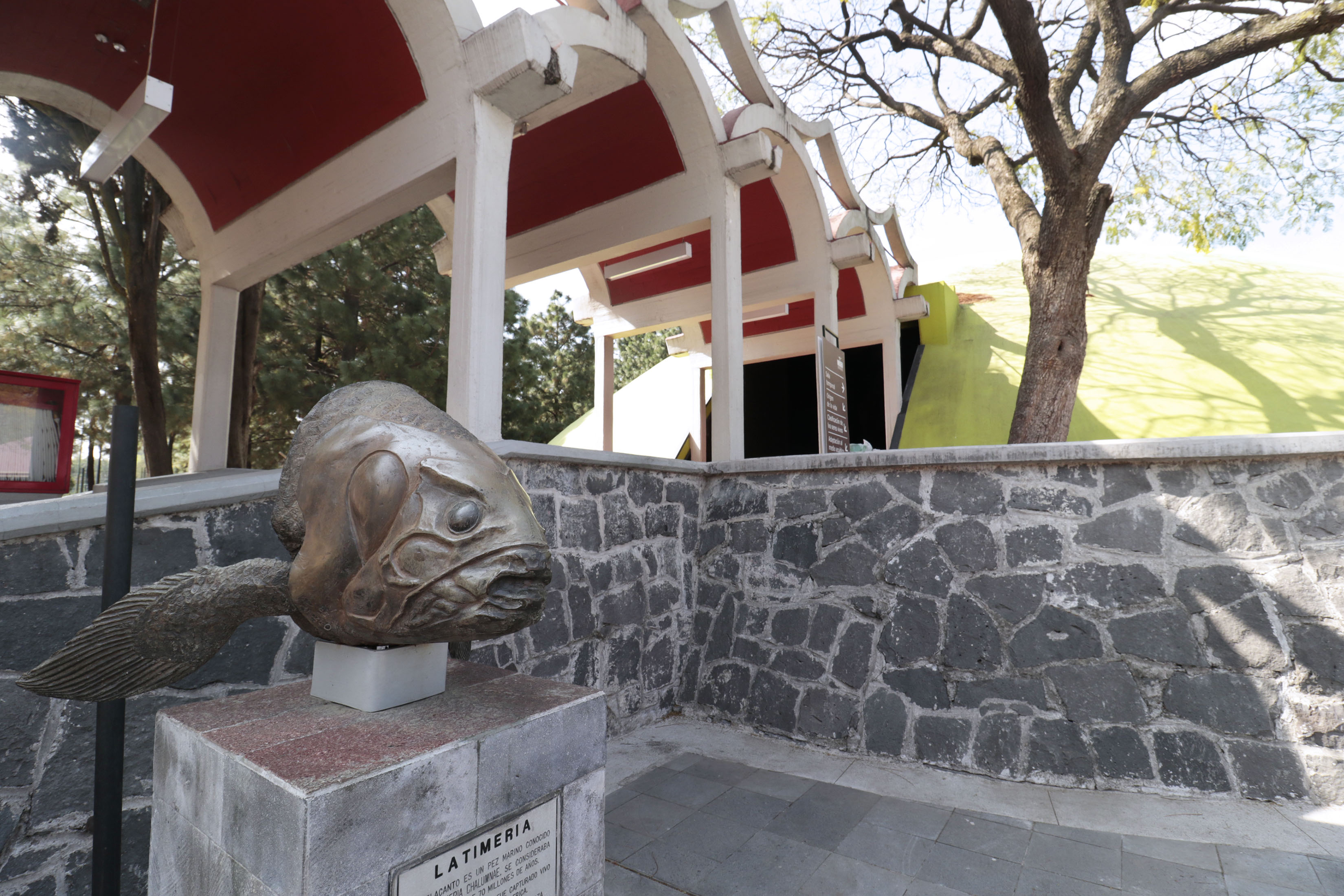 Miércoles 14 de febrero de 2018. Un museo de visita 2018…para muestra un botón tiene presencia en el Museo de Historia Natural albergando en su vestíbulo hasta el 28 de febrero la colección de litografías del pintor Pablo O´Higgins (1904-1983) piezas que forman parte del acervo del Museo de la Ciudad de México, donado por María de la Fuente de O´Higgins. Fotografía: Tania Victoria/ Secretaría de Cultura CDMX Miércoles 14 de febrero de 2018. Un museo de visita 2018…para muestra un botón tiene presencia en el Museo de Historia Natural albergando en su vestíbulo hasta el 28 de febrero la colección de litografías del pintor Pablo O´Higgins (1904-1983) piezas que forman parte del acervo del Museo de la Ciudad de México, donado por María de la Fuente de O´Higgins. Fotografía: Tania Victoria/ Secretaría de Cultura CDMX